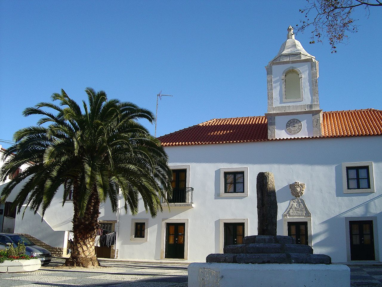 Antigamente, aqui era a sede do concelho.